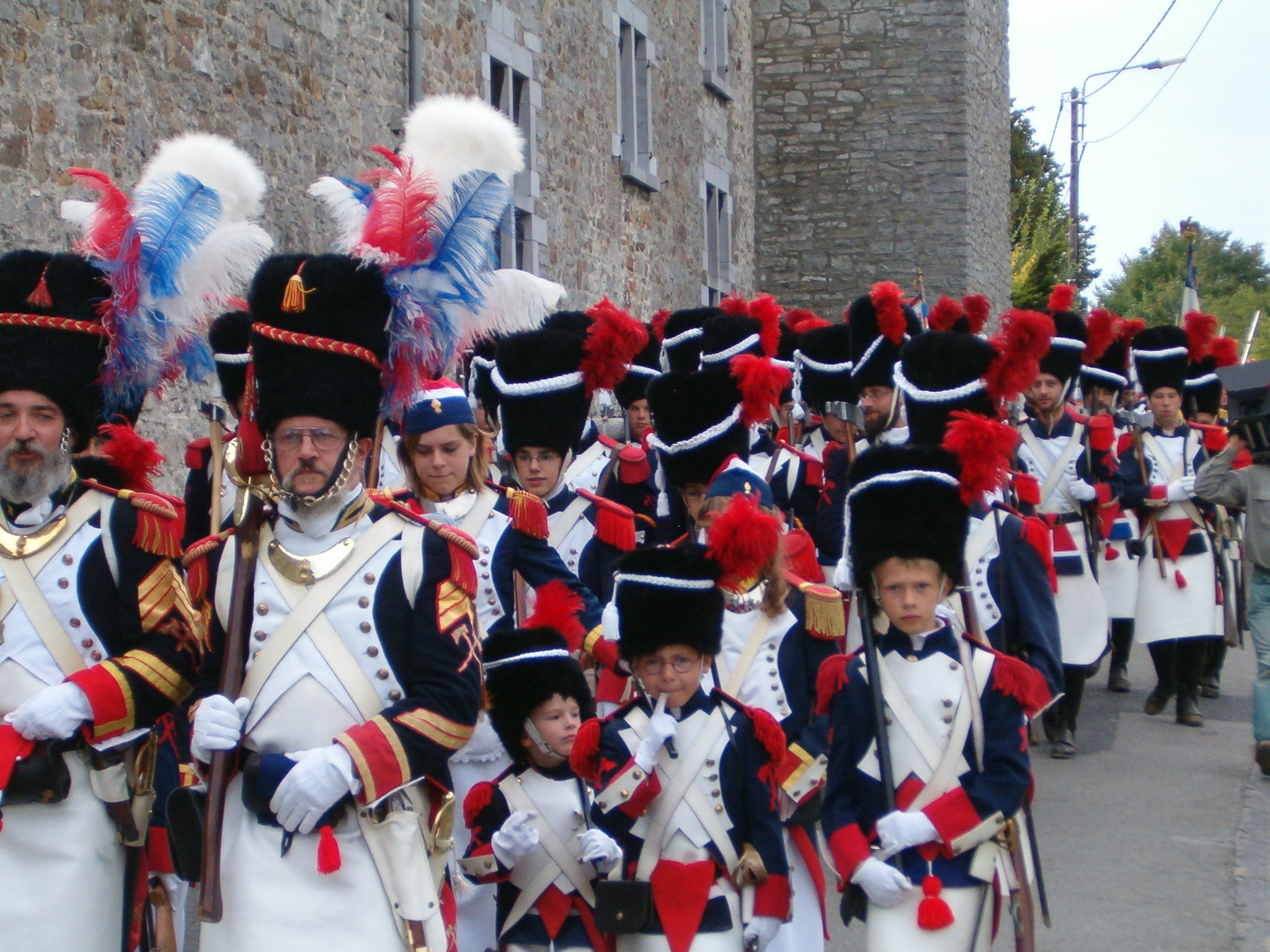 7-jaarlijkse Marche Saint-Feuillen in Fosses-la-Ville op zondag 25 september 2005